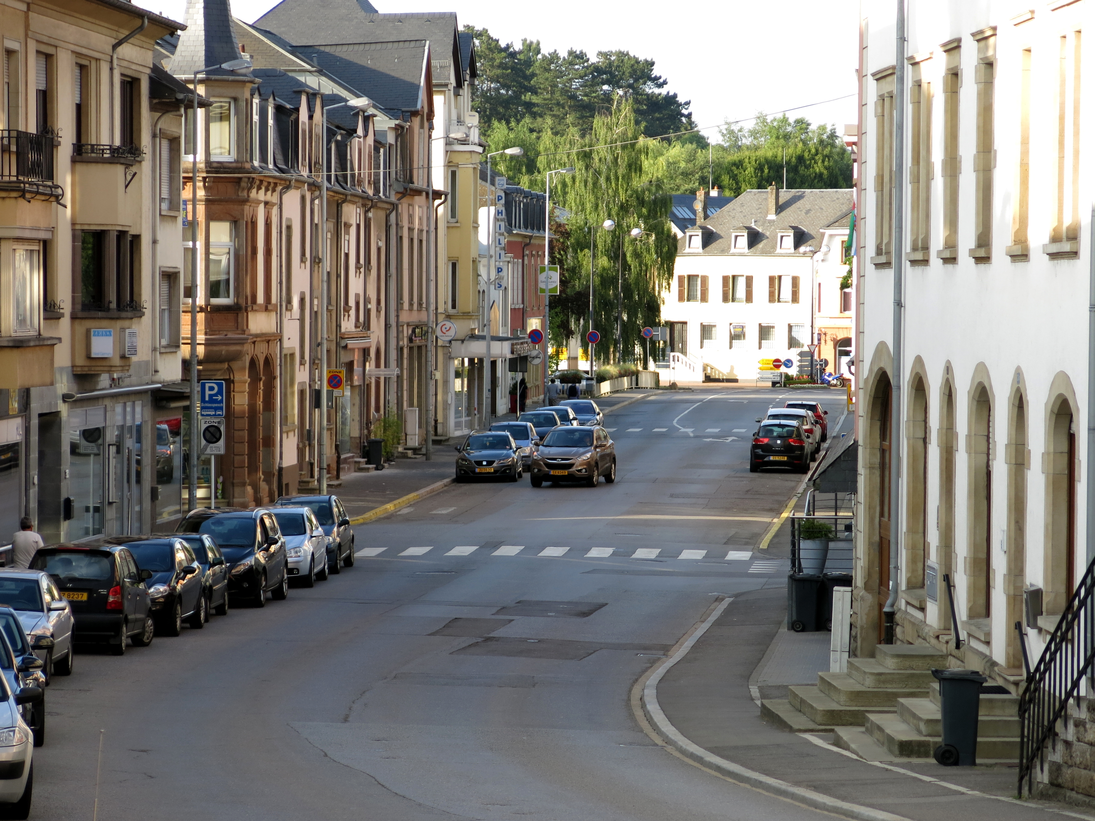 D'Rue Grand-Duchesse Charlotte zu Miersch no Norde gekuckt.